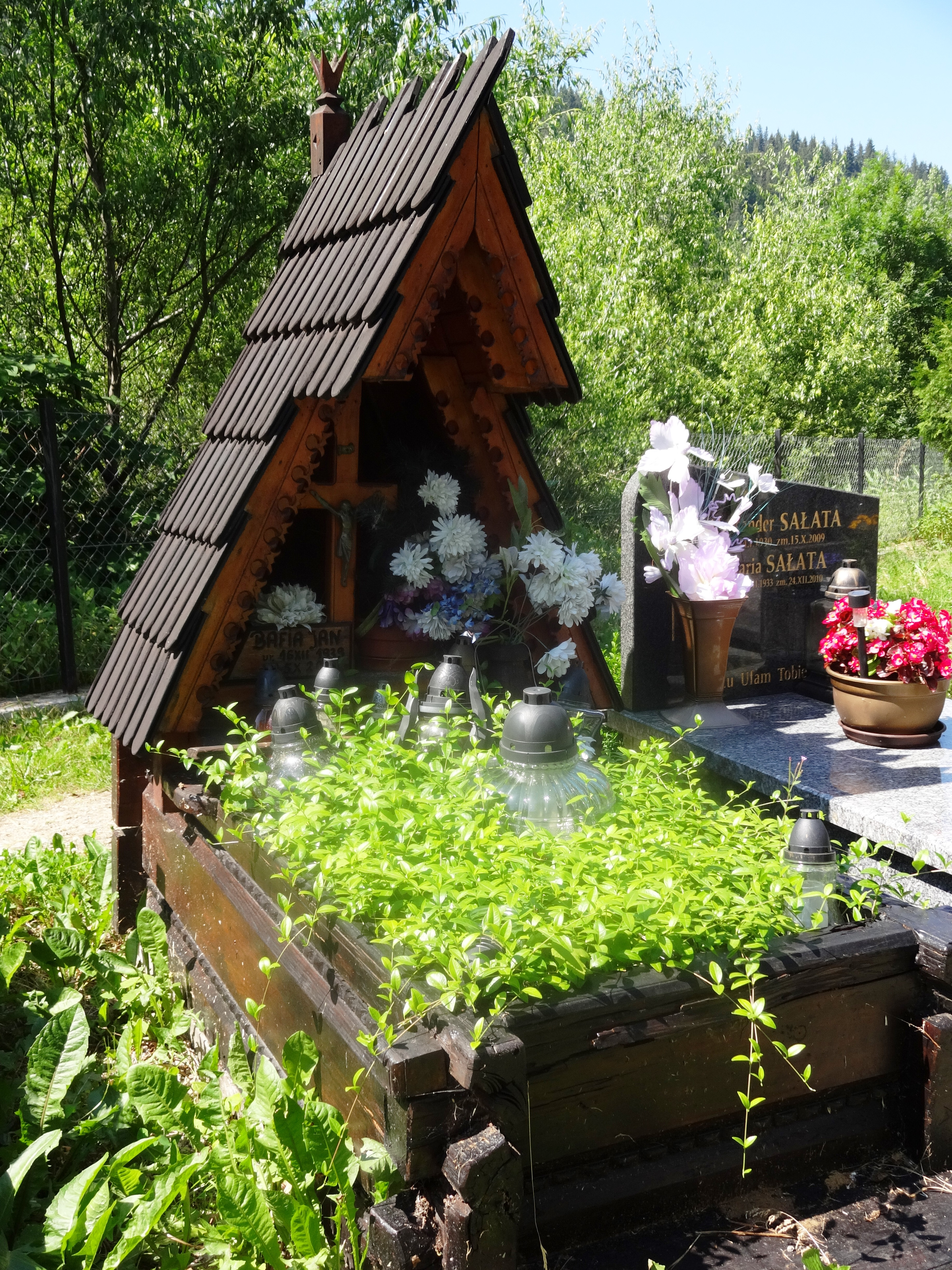 New Cemetery in Zakopane